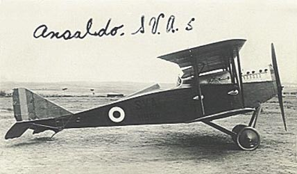 Ansaldo S.V.A.5